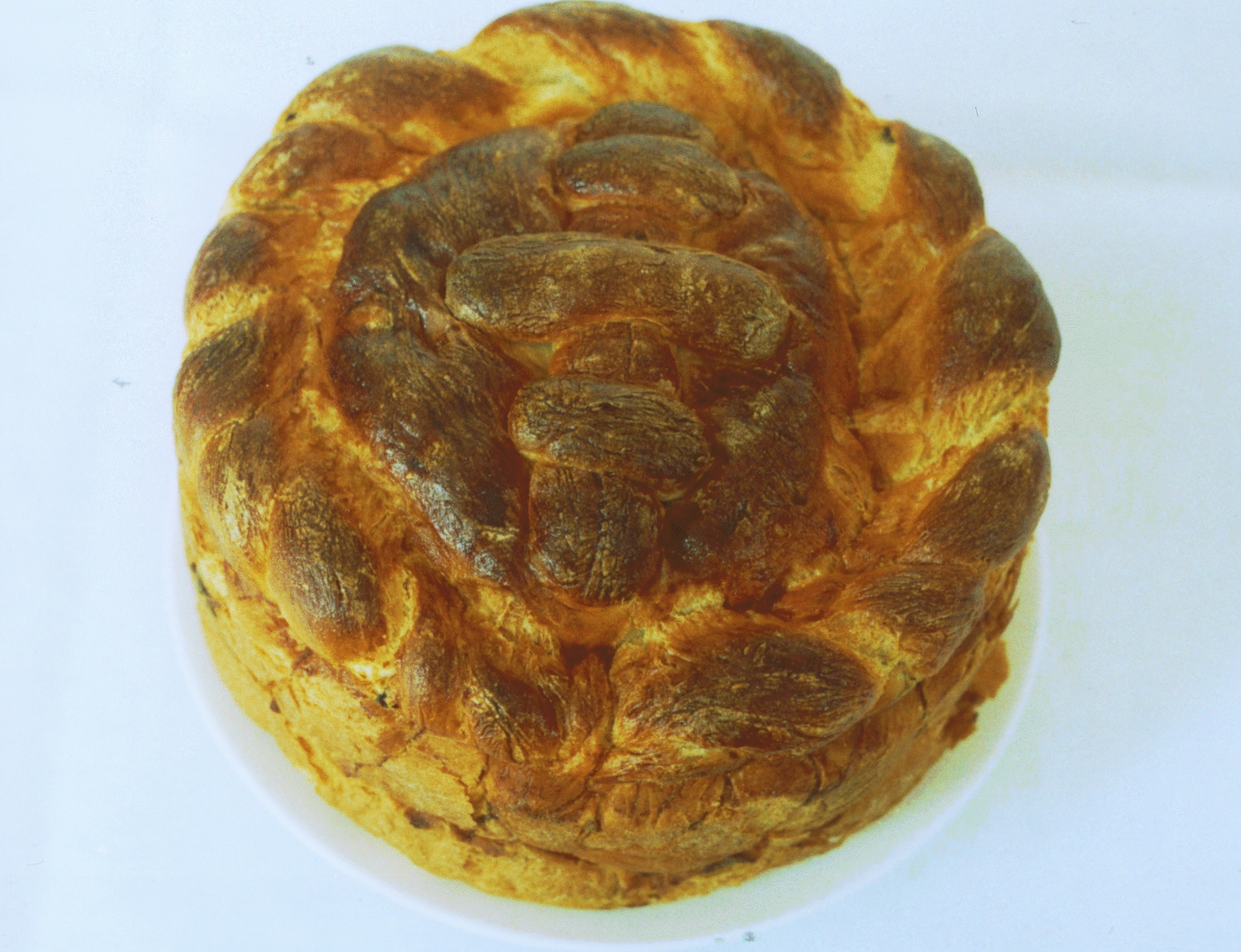 Pascha koláč u gréckokatolíkov na Slovensku. Photo taken by Jozafát Vladimír Timkovič, OSBM